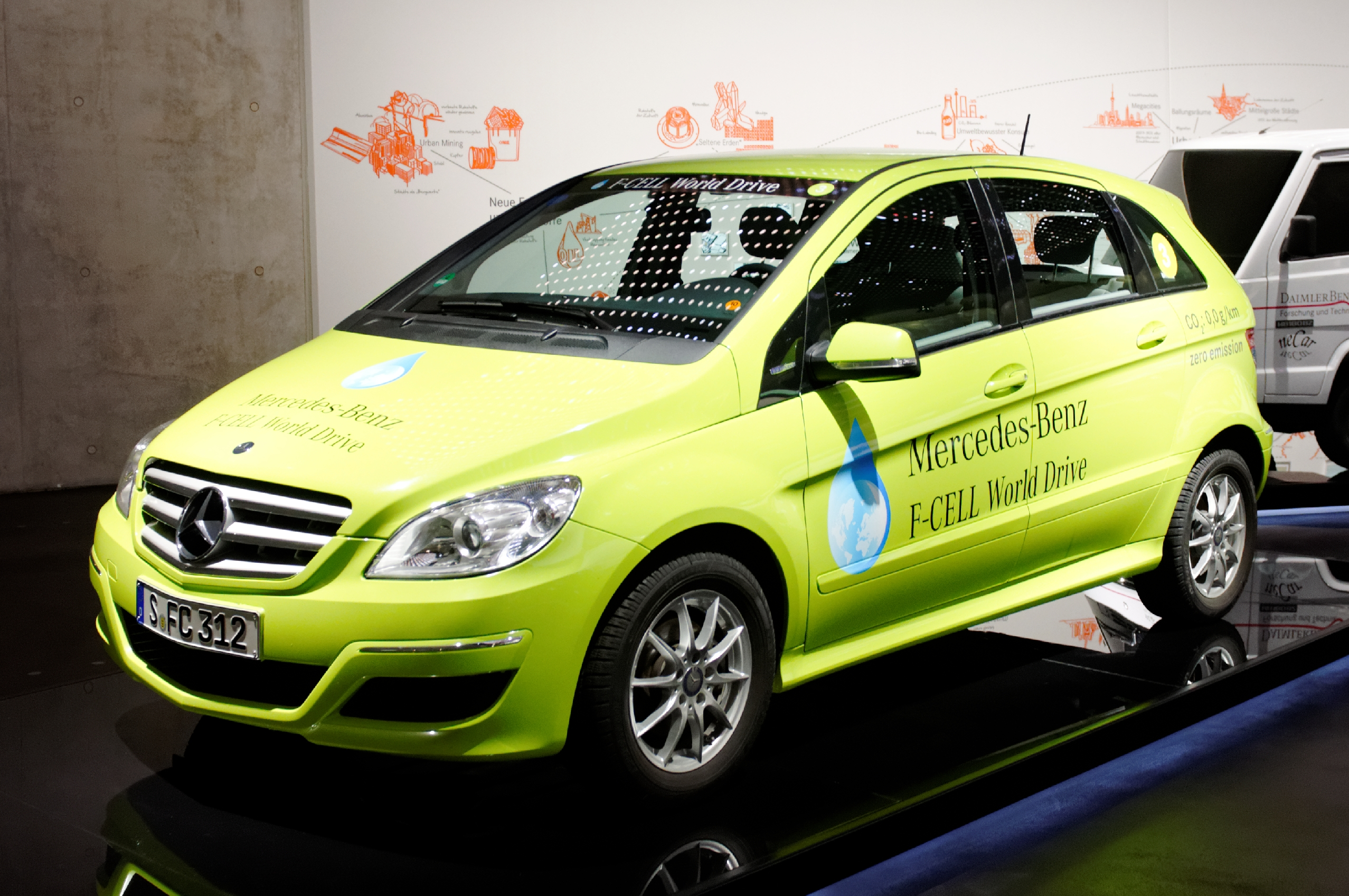 Bilder aus dem Mercedes-Benz-Museum 2015